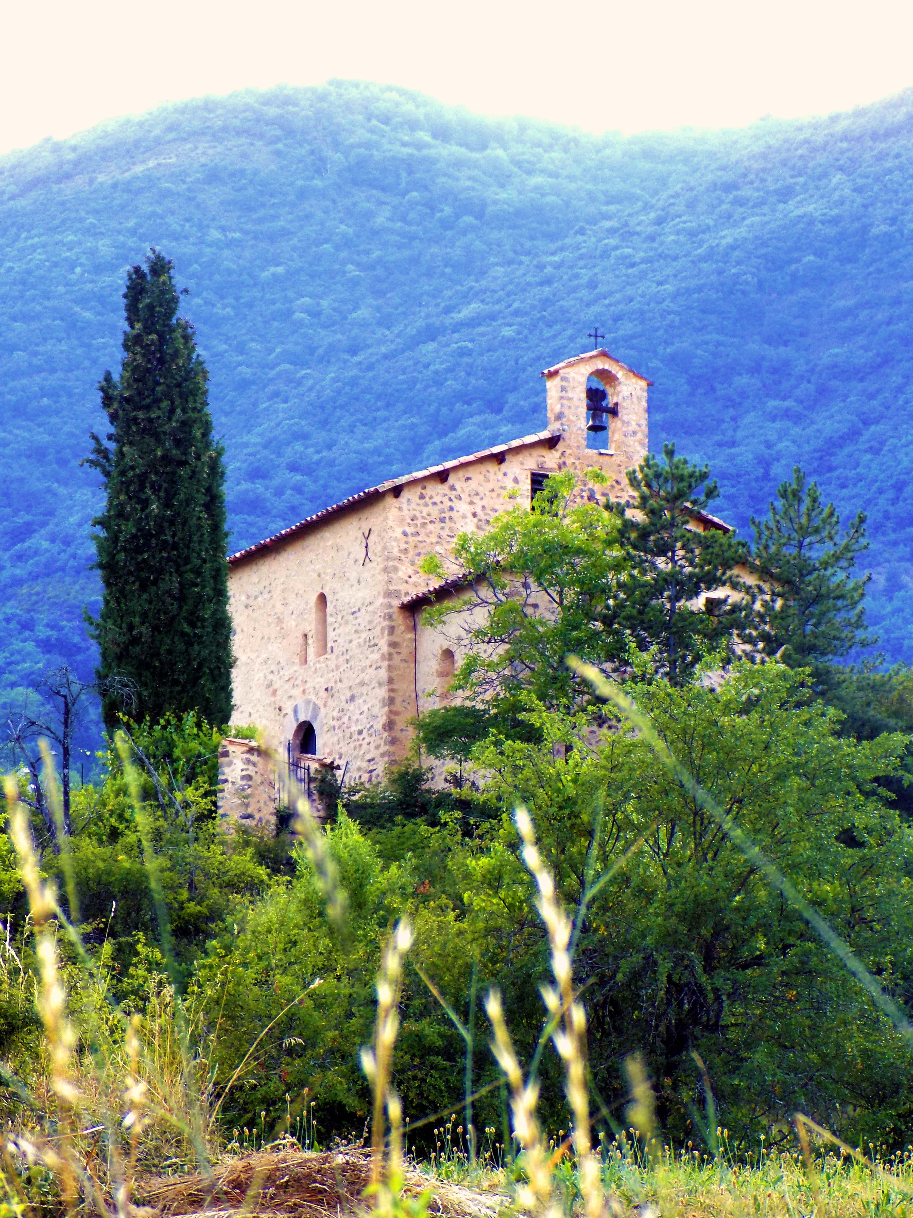 Chapelle du XII éme siècle au cimetière de la commune de La Robine sur Galabre